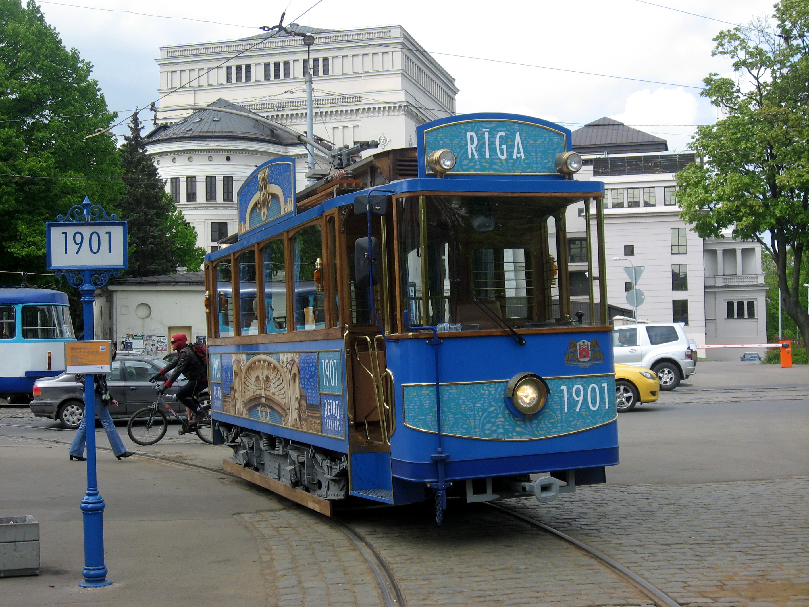 Retro tramvaj v Rize